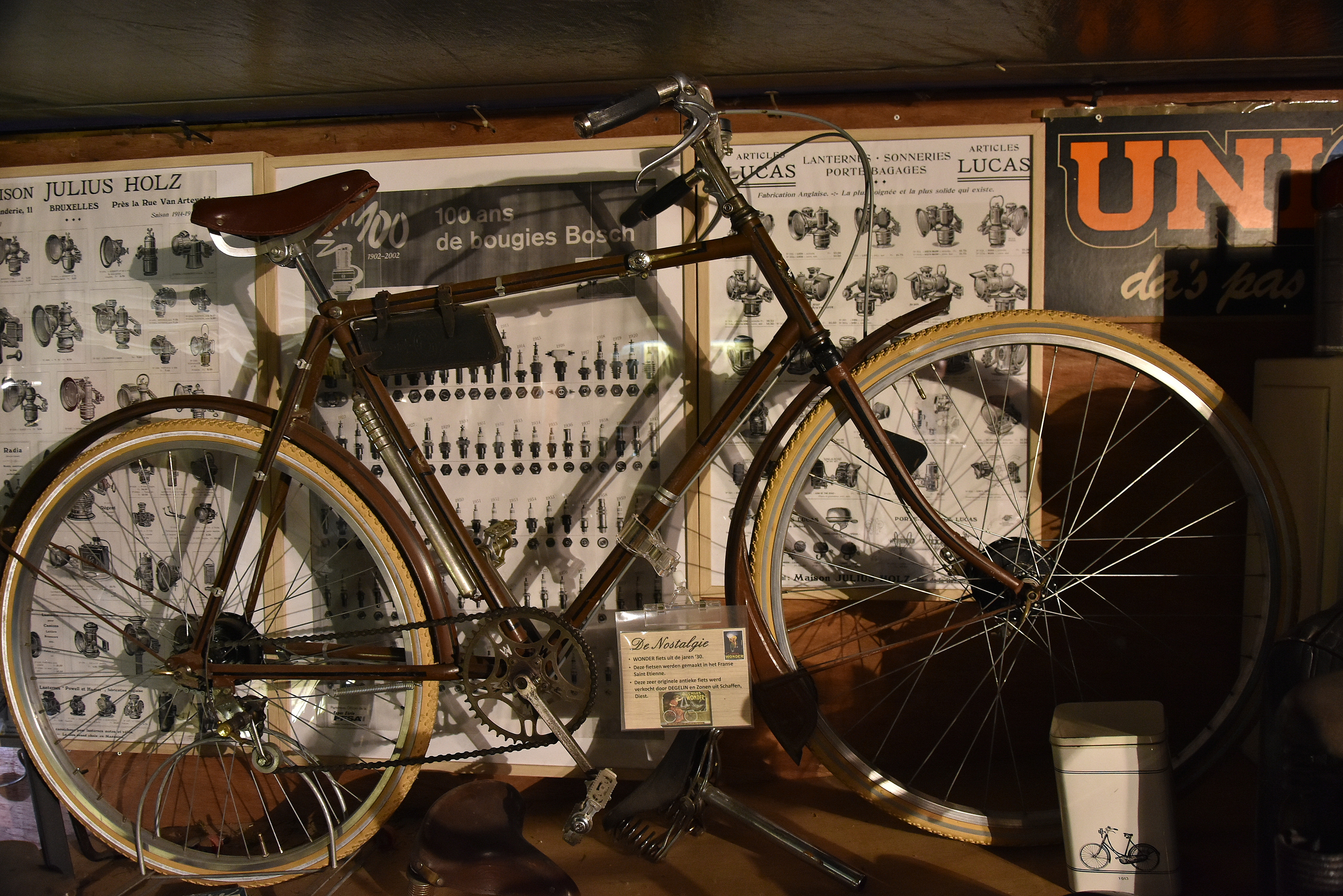 Fiets 'Wonder' (rond 1930) Landbouwmuseum De Nostalgie - Uikhoven 10-06-2019